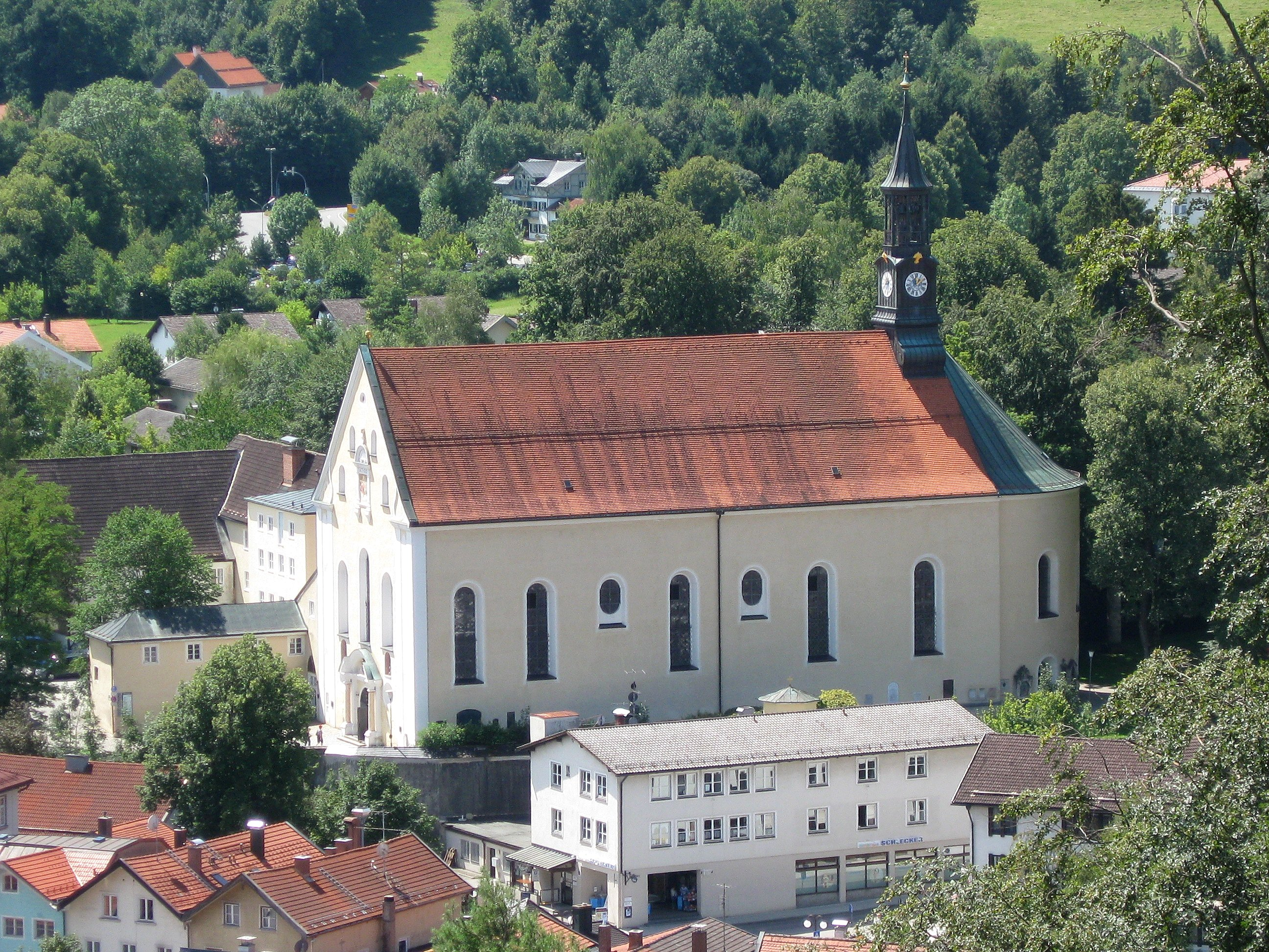 Franziskanerkloster; kath. Klosterkirche Hl. Dreifaltigkeit, barocker Wandpfeilersaal mit ausgeschiedenem Chor, Psallierchor und Dachreiter, von Aichardus Holzleithner, 1733-35; mit Ausstattung; Konventgebäude, dreigeschossige mehrflügelige Anlage mit Walmdächern, etwa gleichzeitig, später verändert; ehem. Friedhofsmauer, Mauer des 1922 aufgelassenen Friedhofs; Kriegergedenkstätte, Steinsarkophag zwischen steinernen kugelbesetzten Stehlen, 1927.